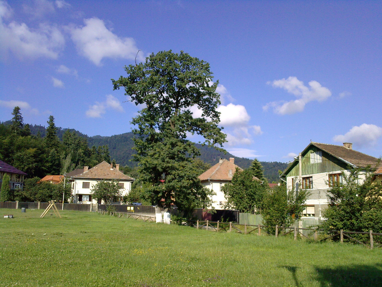 Quartier Noua, Brasov, Romania